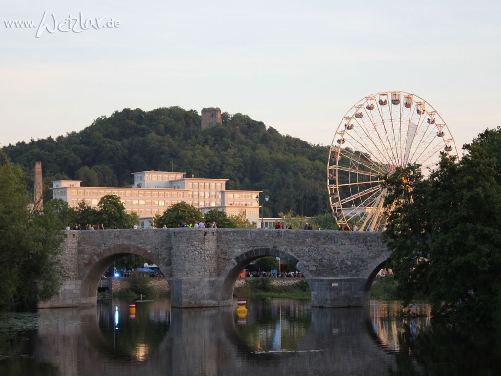 Blick auf das Rathaus Wetzlar, die alte Lahnbrücke und das Riesenrad während des Hessentags 2012 - im Hintergrund Burg Kalsmunt